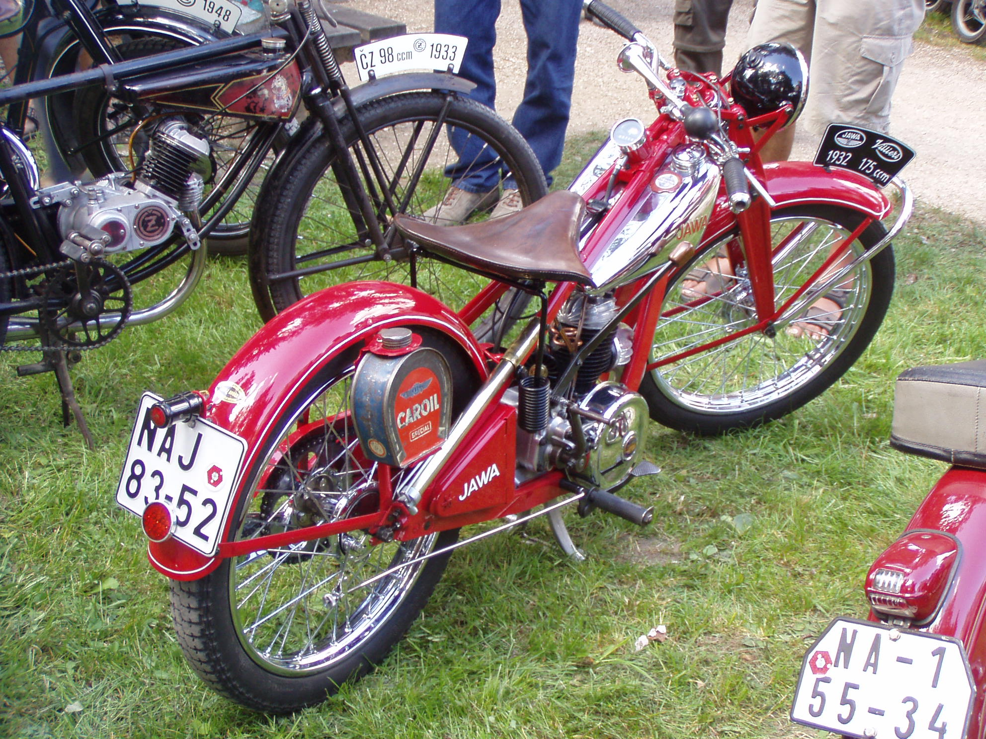 Jawa 175 Villiers (1932)